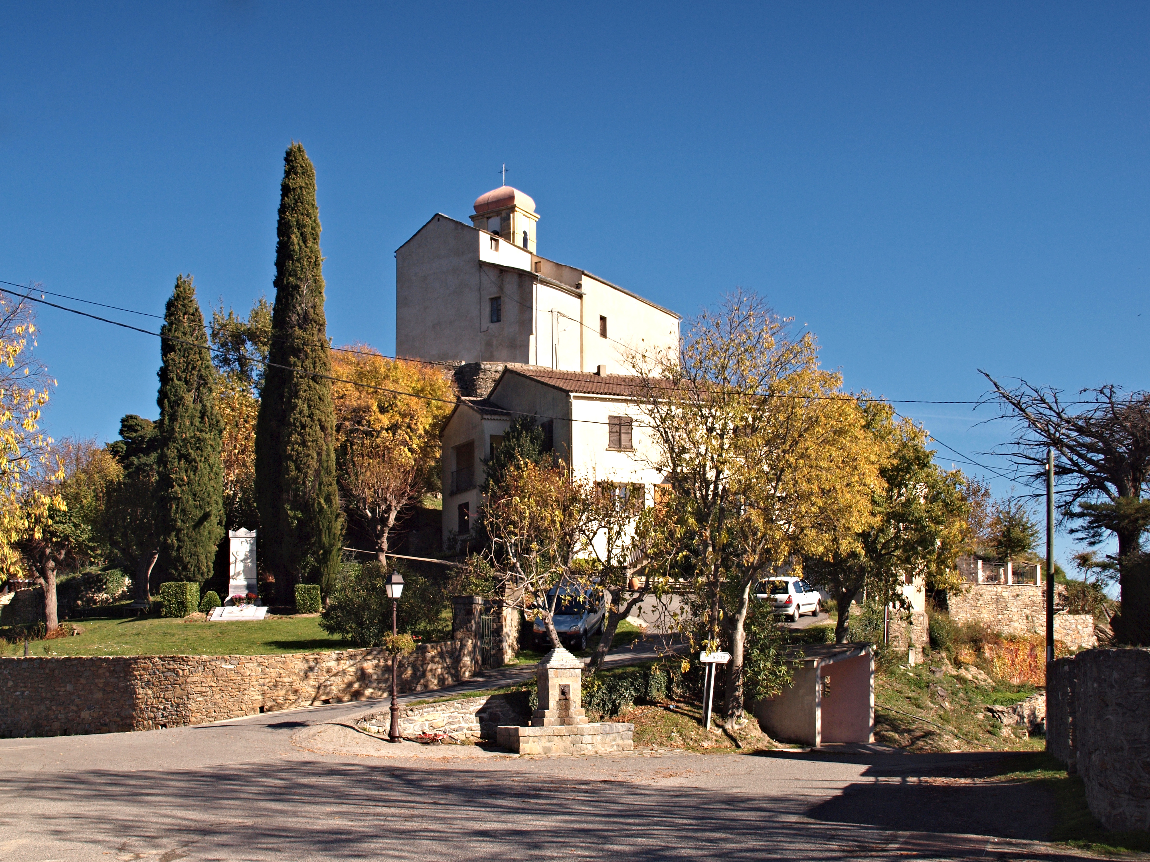 Poggio-di-Venaco (Corsica) - Place Fouada